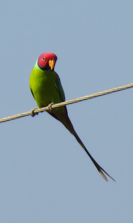 At Tikarpara, Satkosia Tiger Reserve, Odisha, India on 26-12-2012 Birds, fauna, wildlife at Tikarpara, Satkosia Tiger Reserve, Odisha, India